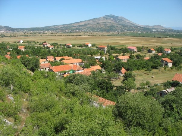 Pogled na Prominu iz Krički.